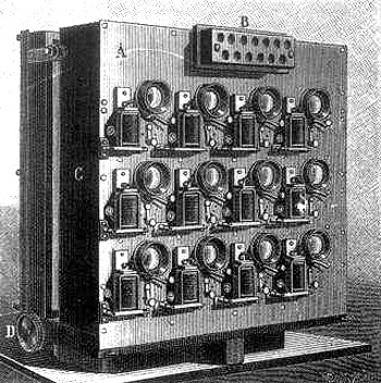 Étienne-Jules Marey: Albert Londe's twelve lens camera, 1893